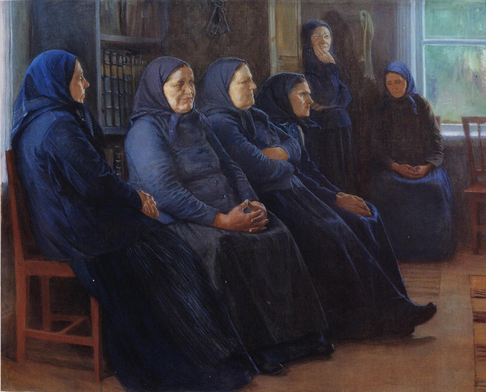 Venny Soldan-Brofeldtin maalaus Heränneitä. Maalaus esittää herännäisseuroja taiteilijan appivanhempien kodissa Iisalmen pappilassa.